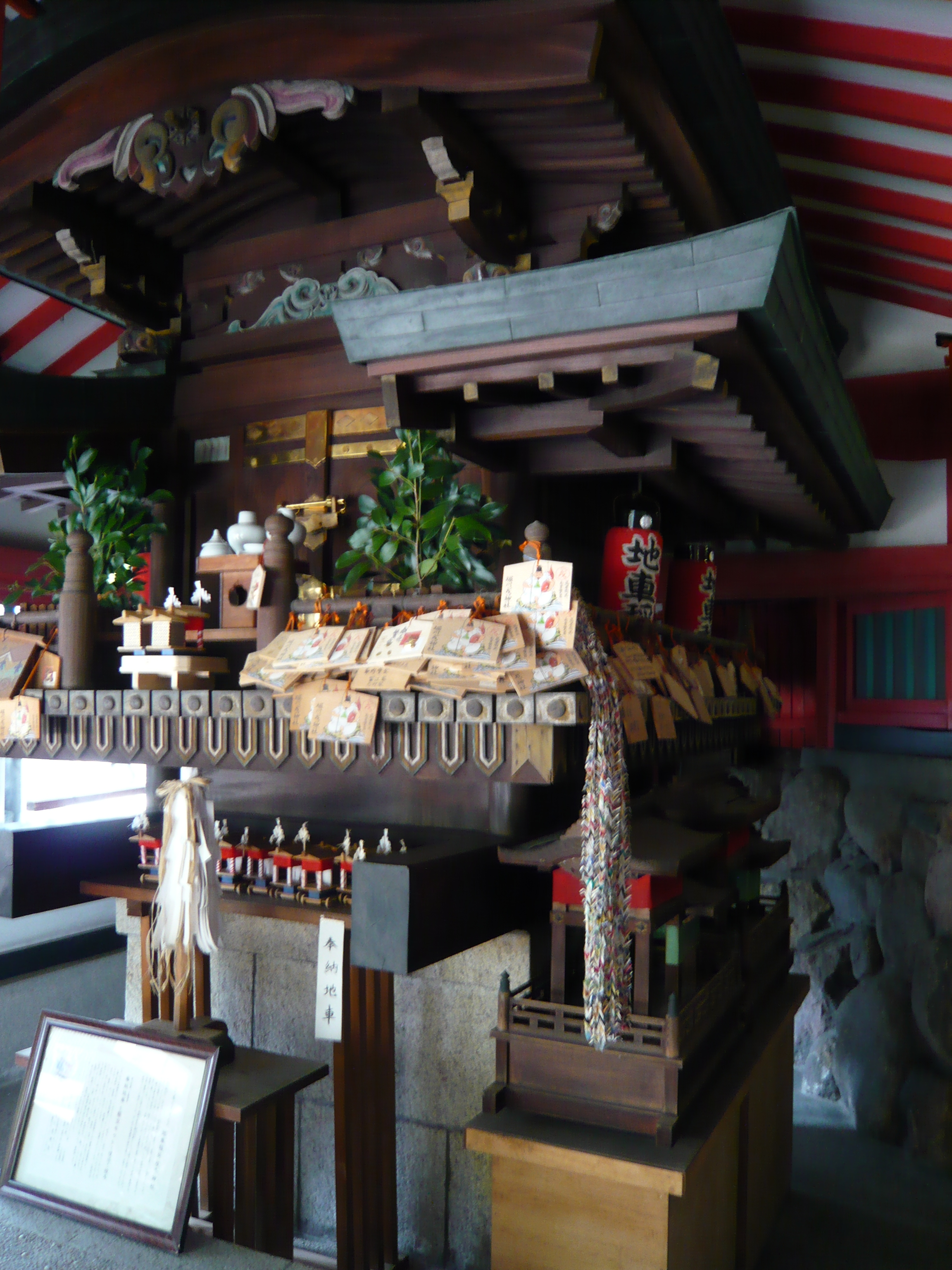 Danjiri-inari in Horikawa-ebisu-jinja, Kita, Osaka, Japan 堀川戎神社（大阪市北区）内 地車稲荷